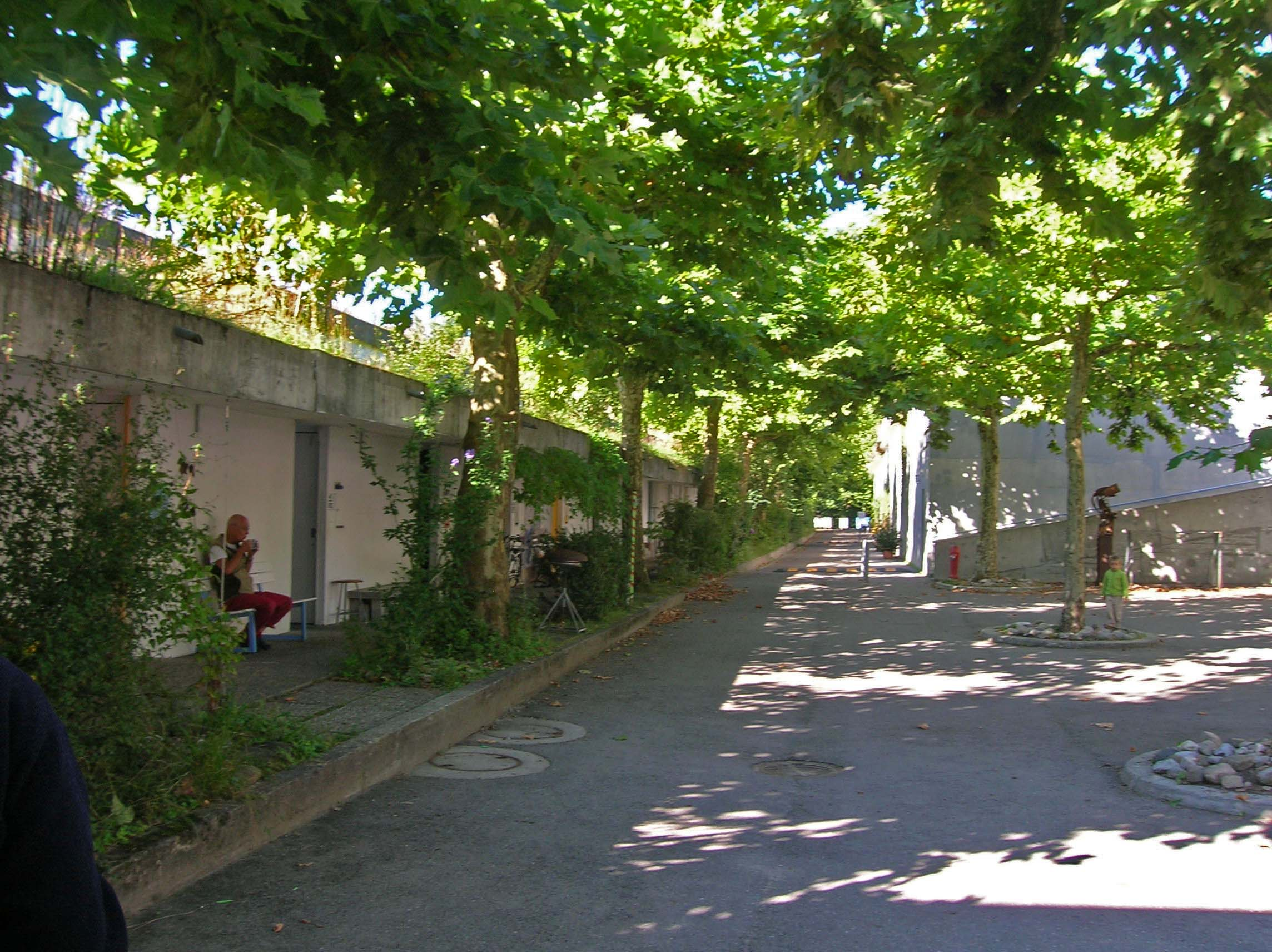 Halensiedlung, Dorfplatz